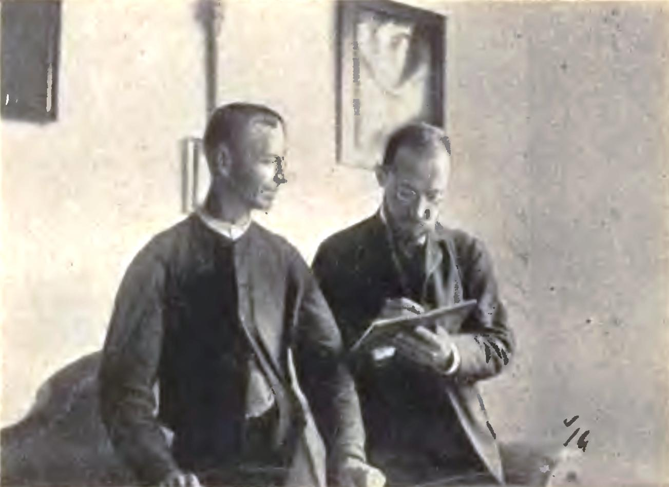 Tailor Ludwik Sikora from Jablunkov and professor Kazimierz Nitsch